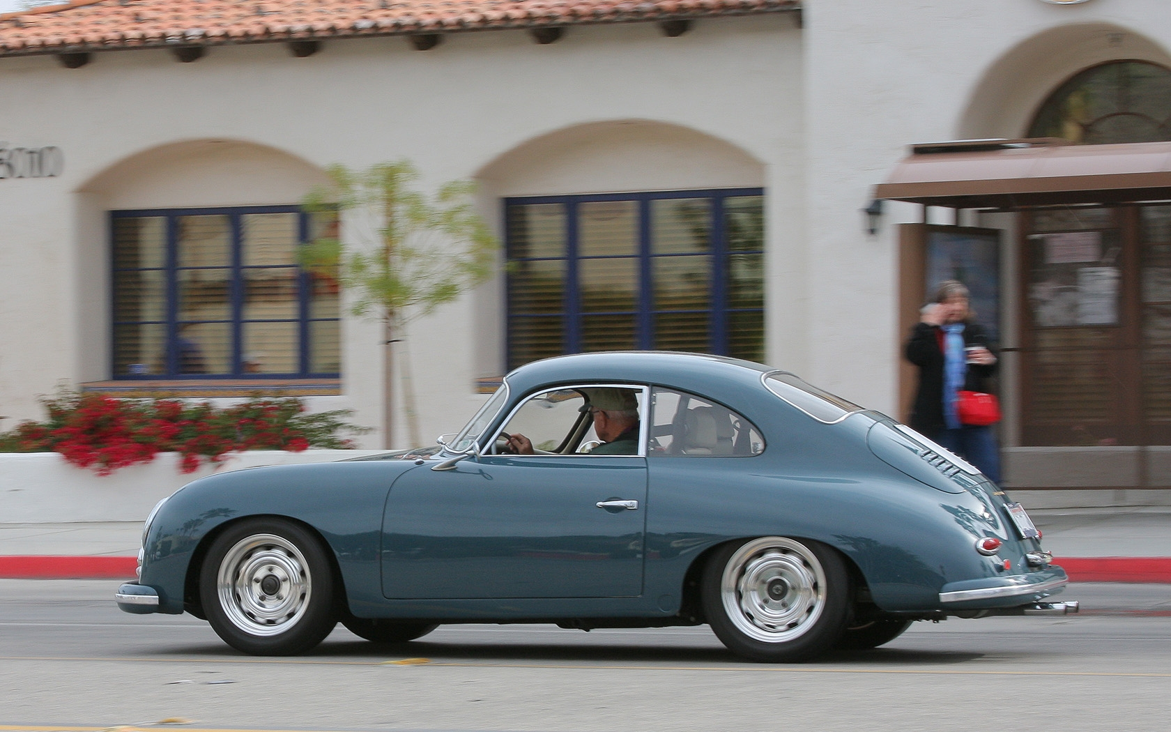 1957 Porsche 356 - svl